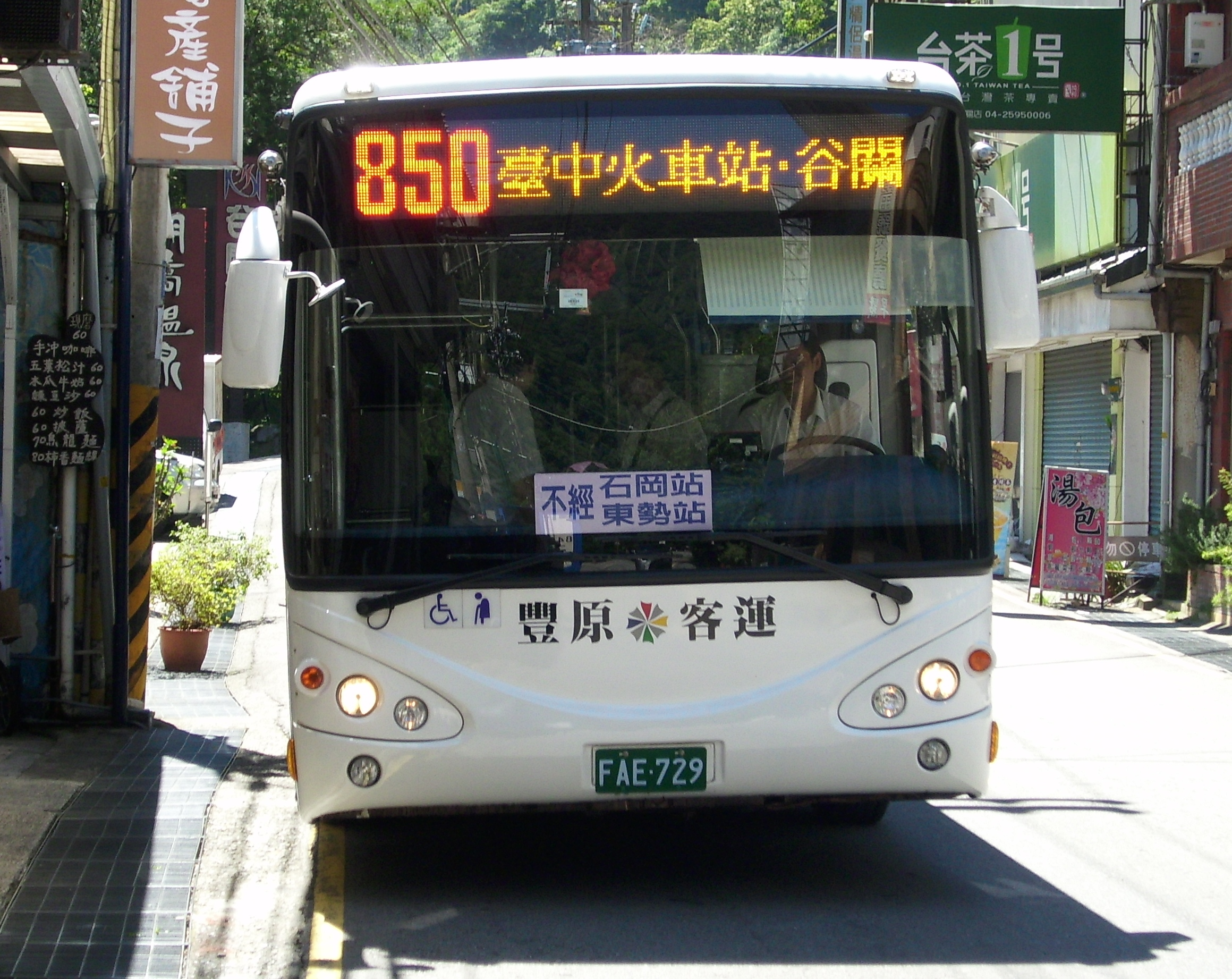 豐原客運申沃SWB6127大客車FAE-729行駛臺中市公車850路。攝於臺中市谷關。